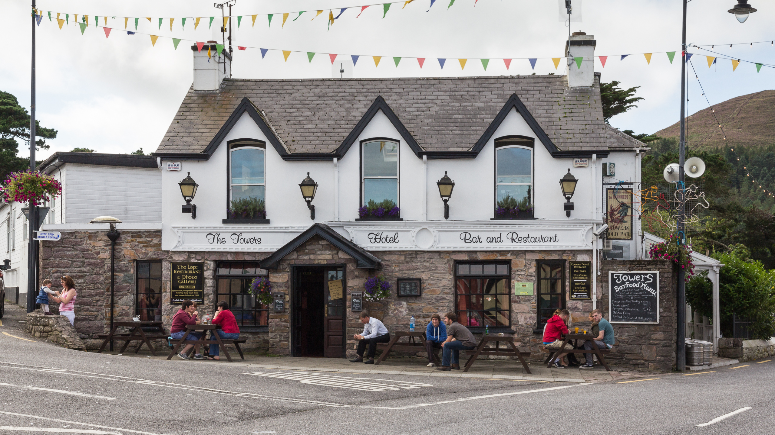 The Towers Hotel Glenbeigh, Co. Kerry, Ireland